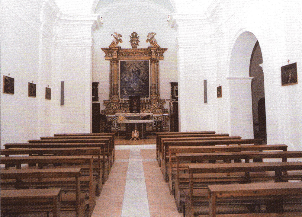 San Giovanni in Fiore - Convento padri Cappuccini - Navata Centrale